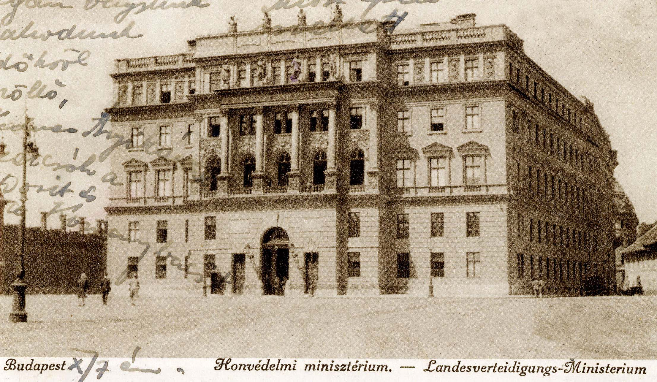 Budapest, Várnegyed, Szent György tér, a Honvédelmi Minisztérium épülete, 1930